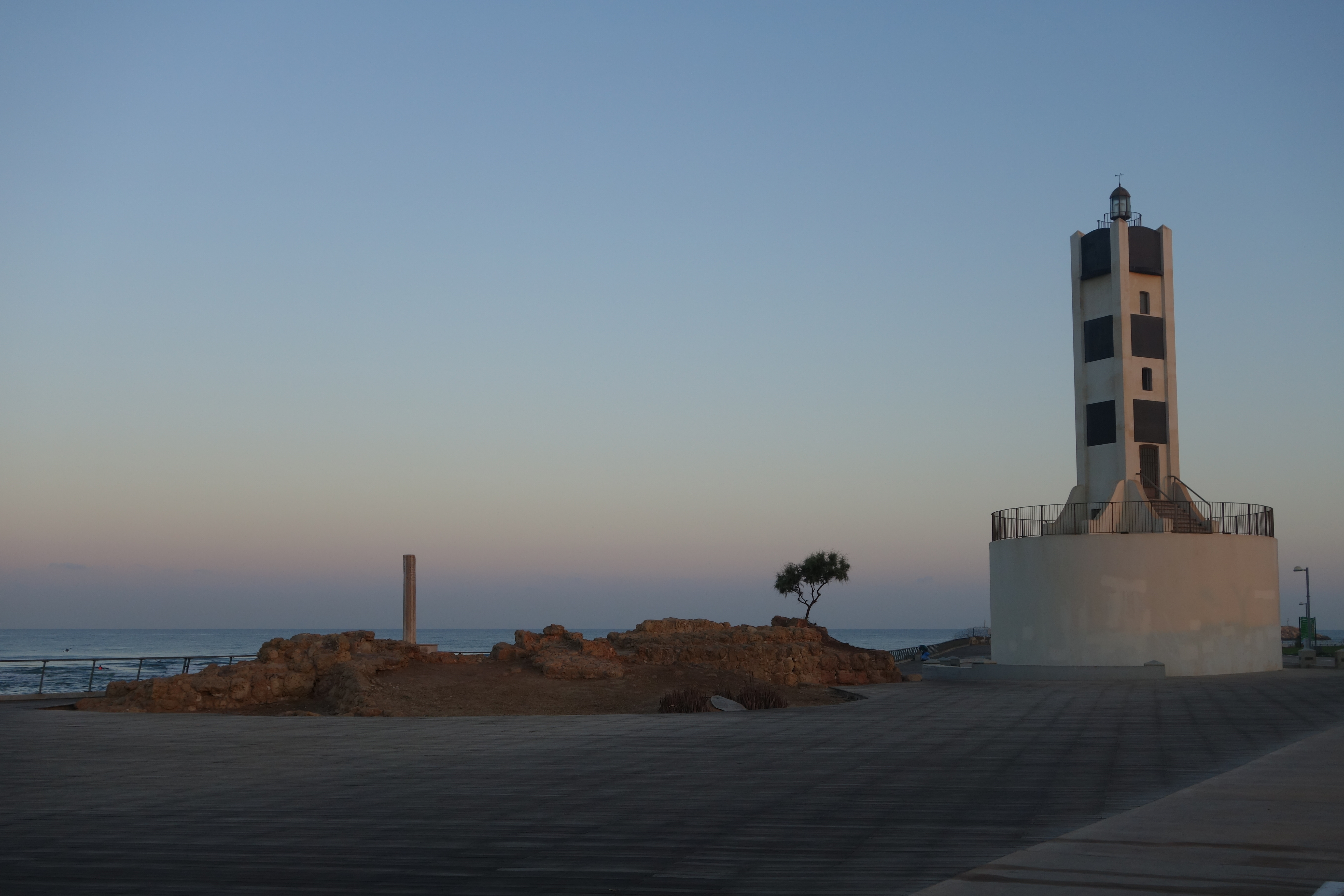 המגדלור בנמל תל אביב (או "מגדלור רידינג") הוא מגדלור הממוקם בחוף שעל יד תחנת הכוח רדינג בצמוד לתל כודאדי שעל שפך הירקון בתל אביב, המגדלור שימש בעבר את נמל תל אביב וכיום אינו פעיל. המגדלור הוקם על ידי הבריטים בשנת 1935 במטרה להזהיר אוניות המתקרבות לחוף מפני שרטונים.